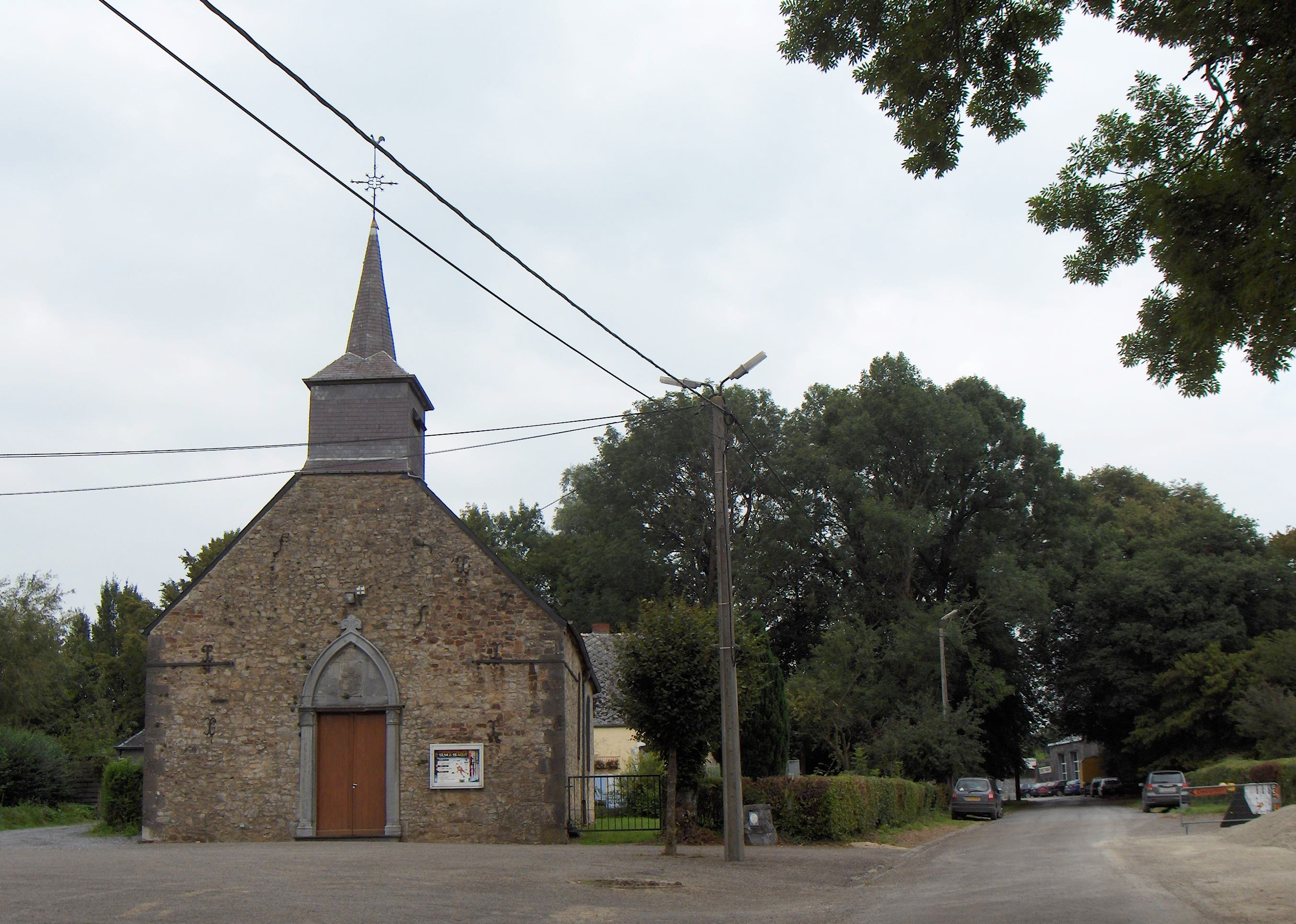 Forge-Philippe (Ortsteil der Gemeinde Momignies, Prov. Hennegau, Belgien).